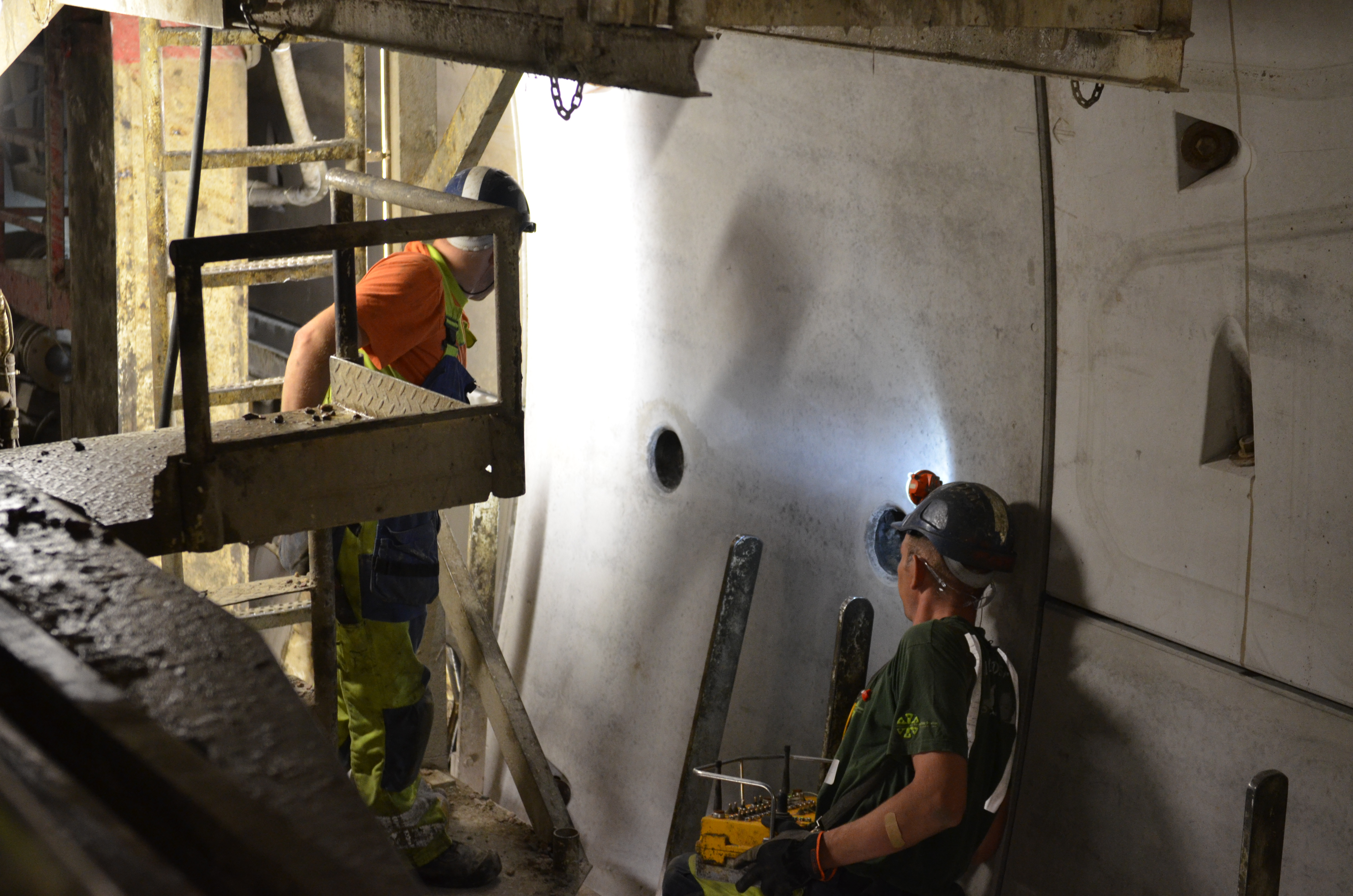 Foto: Louise Andersson/Näringsdepartementet